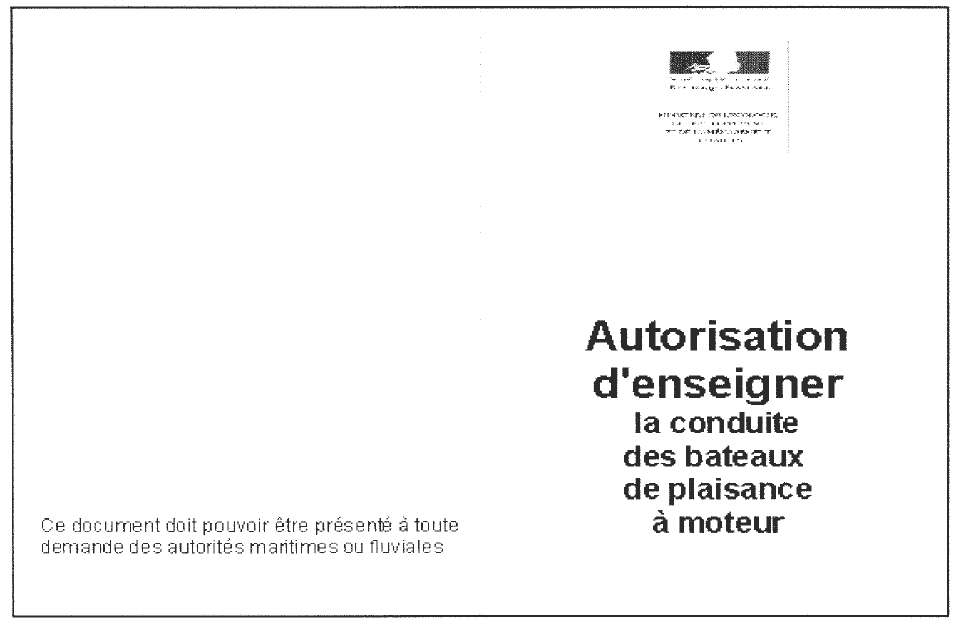 Autorisations d’enseigner la conduire des bateaux de plaisance à moteur